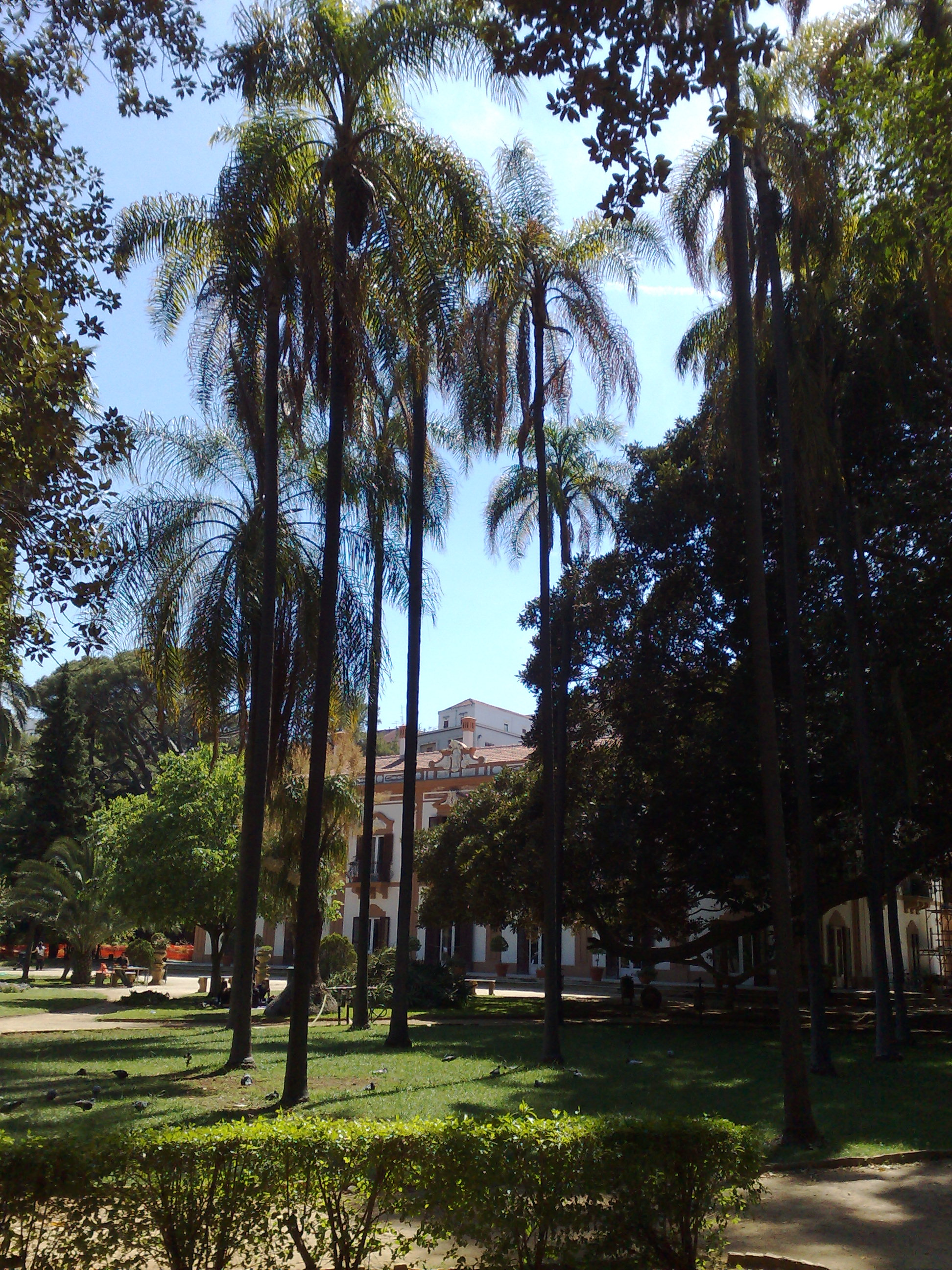 Villa Trabia, Palermo